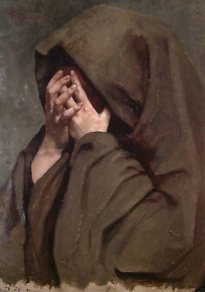 Maleriet «En nonne» av Ragnhild Beichmann